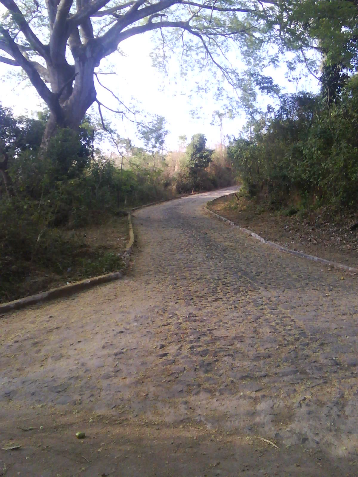 CAMINO A CASERIO LOS SOLARES, AMAQUILCO